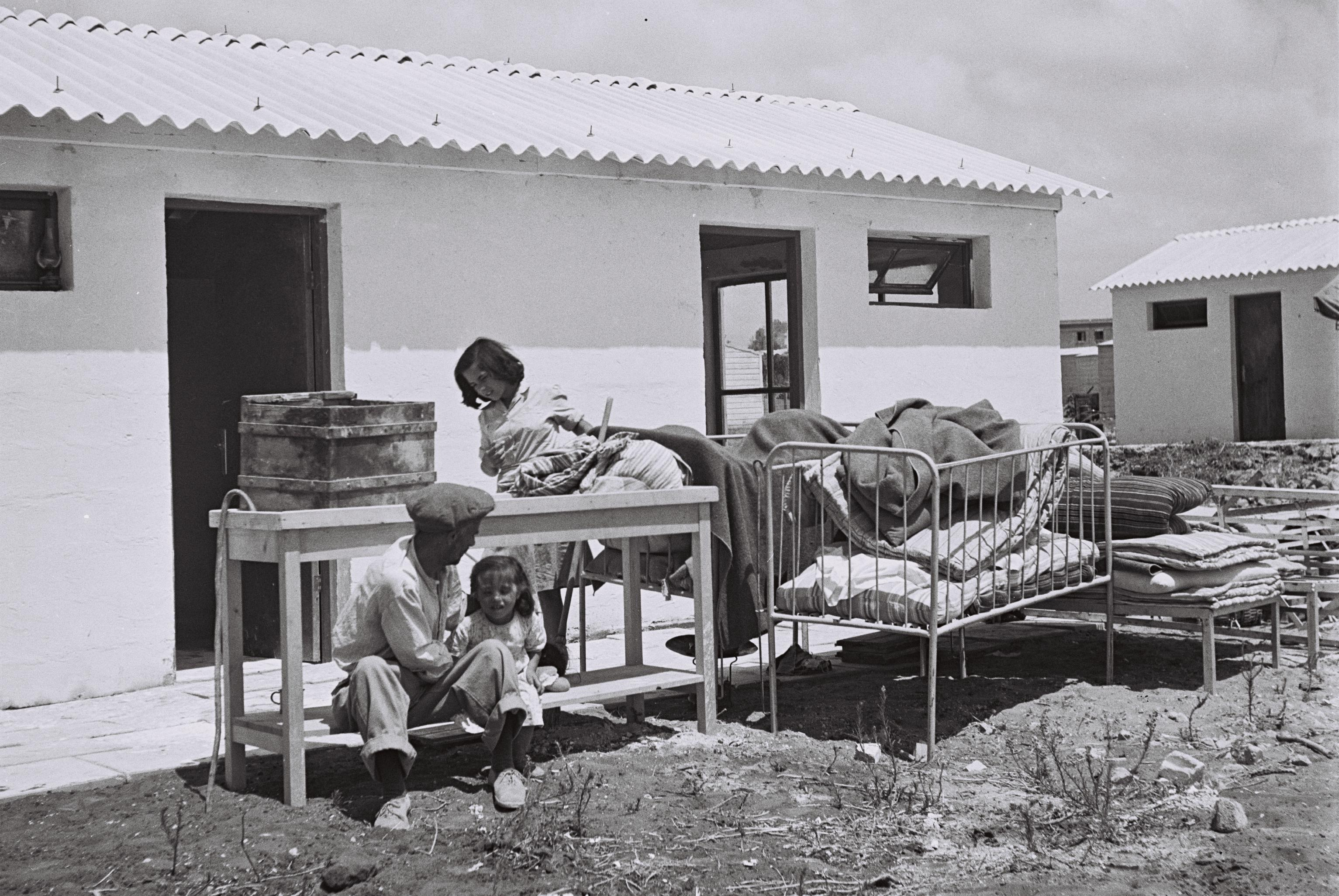 A family of new immigrants moving into one of the huts at a Ma'abara near Tel Aviv. משפחה של מהגרים עוברת לאחת מבקתות המעברה ליד בתל אביב